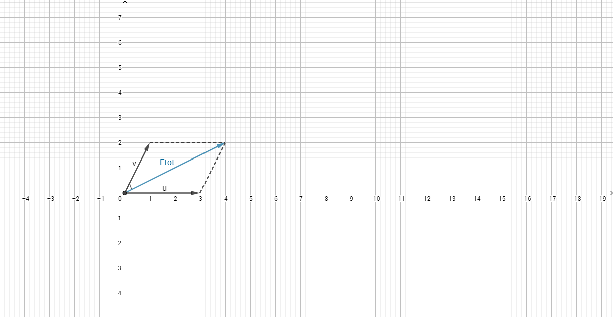 متوازي أضلاع القوى لحساب محصلة قوتين متقاطعتين